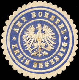 Sealing stamp Title: Amt Borstel - Kreis Segeberg Description: blau, weiß, geprägt Place: Borstel size: 4 cm